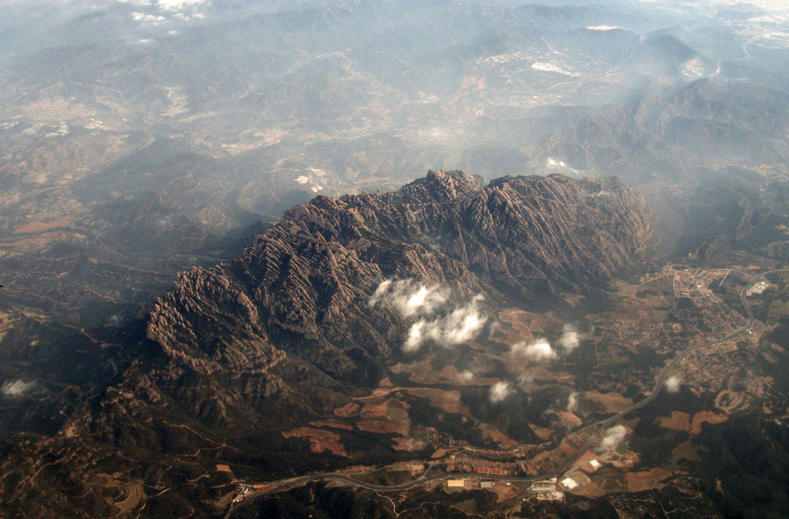 Montserrat visto en un avión Barcelona-Londres